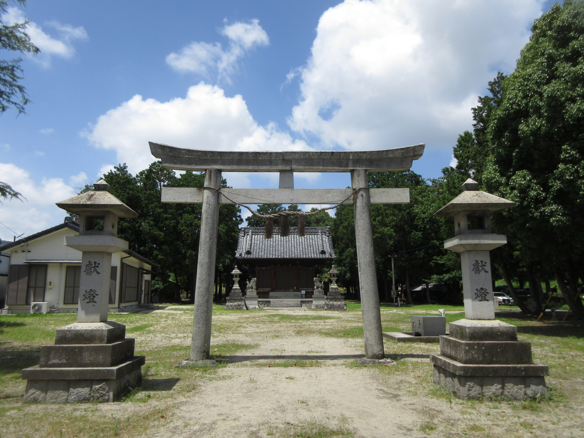 上里神社（岡崎市上里）